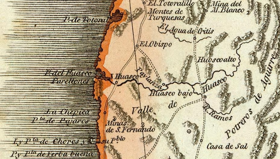 Detalle del Puerto de Huasco del Mapa geografico de America Meridional de Juan de la Cruz Cano y Olmedilla